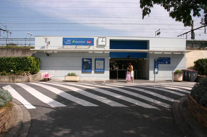 Gare de Vert-de-Maisons. L'entrée de la gare côté Alfortville